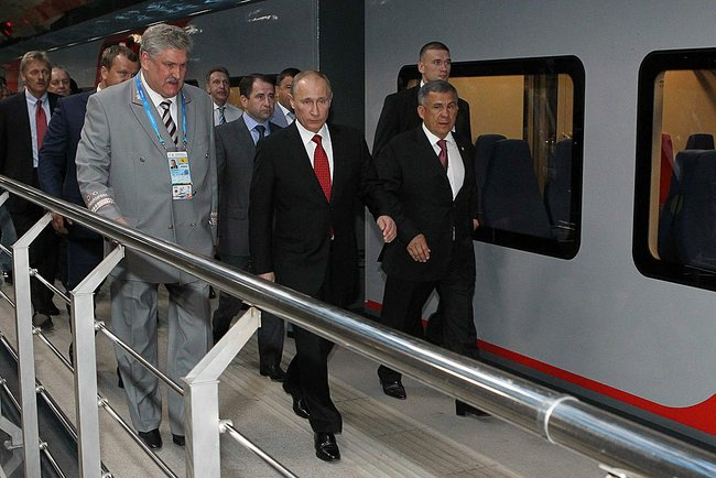 Во время осмотра станции новой интермодальной ветки аэроэкспресса. С Президентом Татарстана Рустамом Миннихановым (справа) и первым вице-президентом ОАО «Российские железные дороги» Вадимом Морозовым.